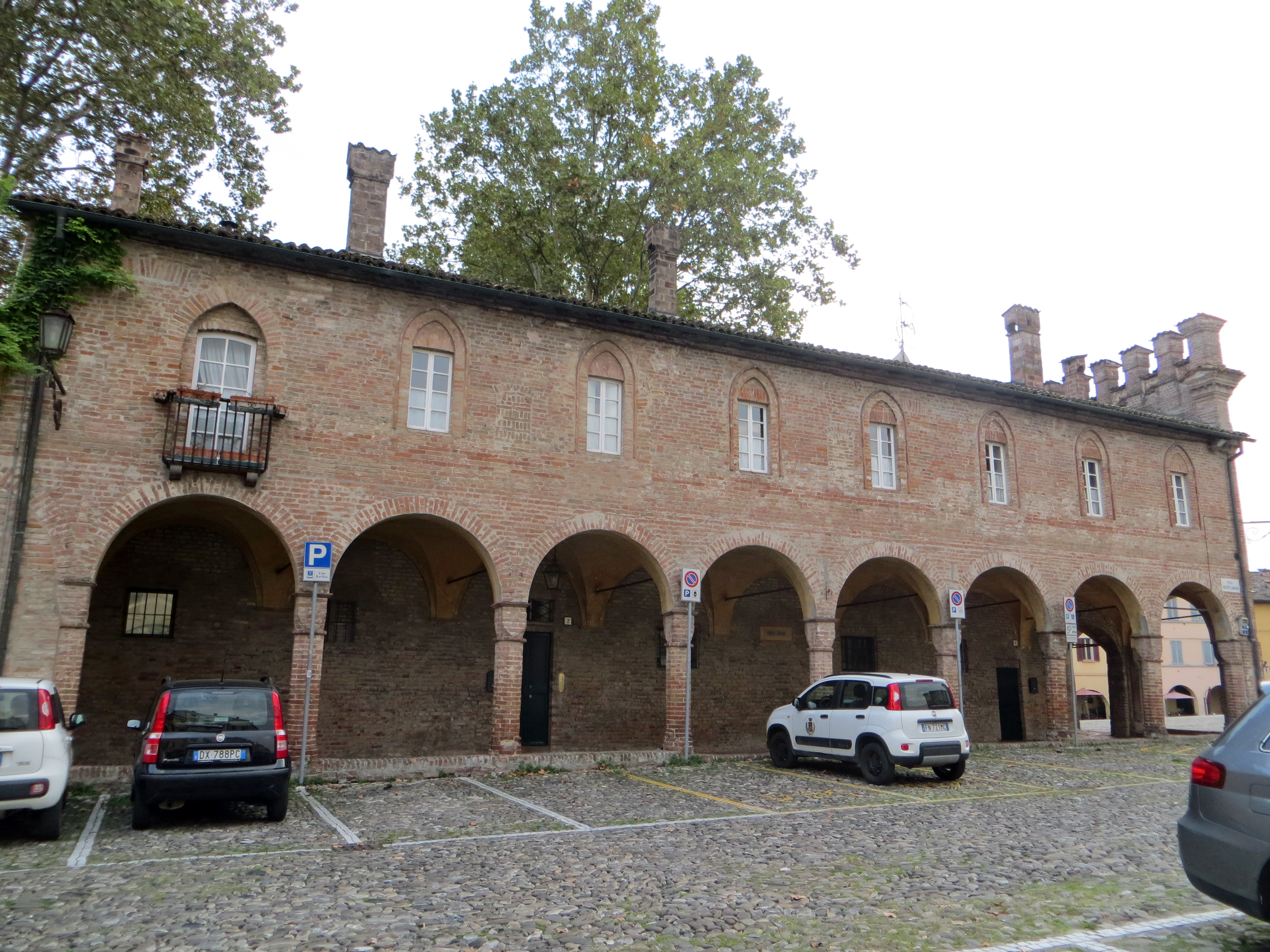 Scuderie Sanvitale (Fontanellato) - facciata nord